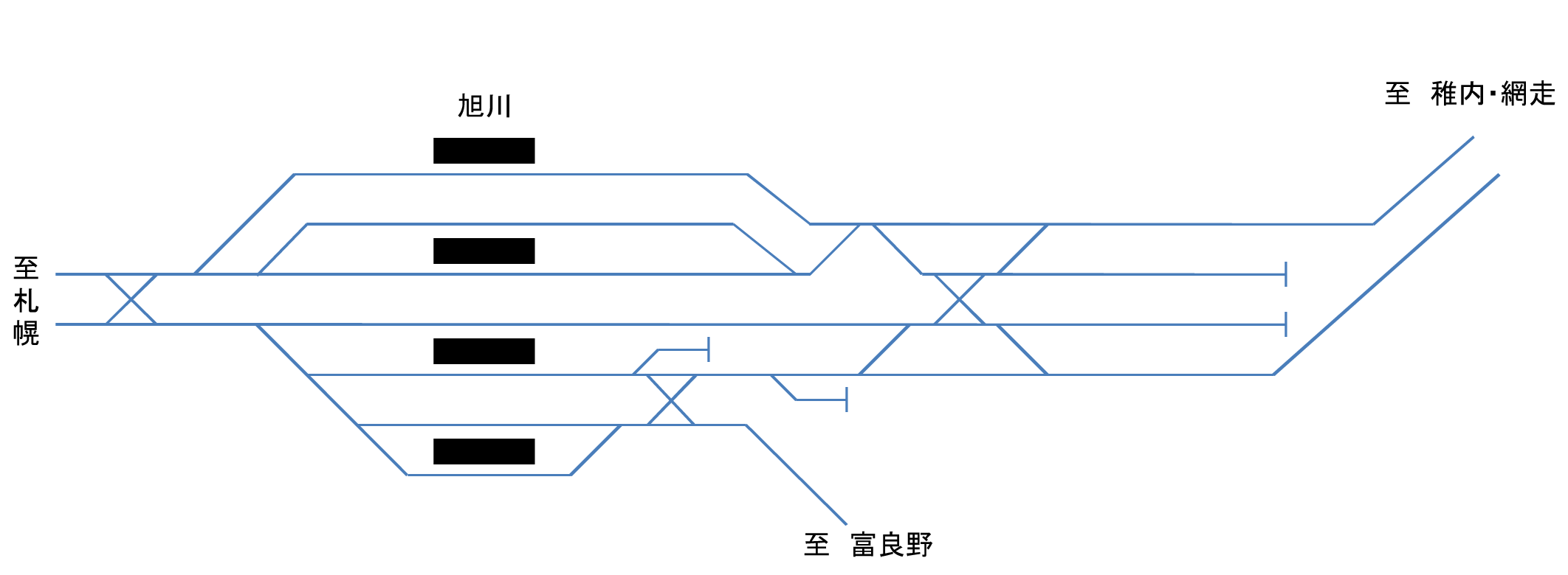 旭川駅の配線図。Googleマップの航空写真を参考に作図。